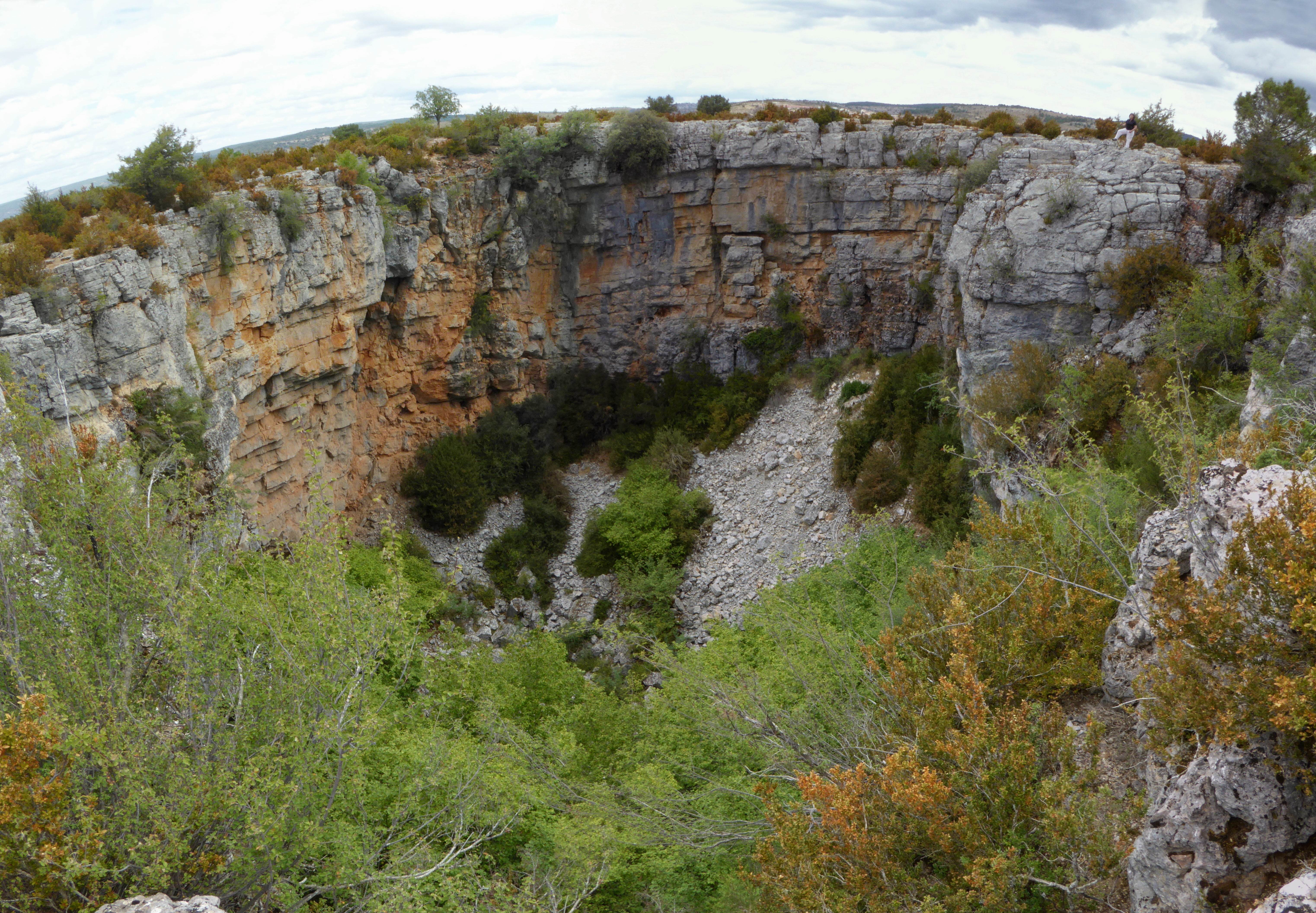 Vista de la Torca de La Cabra, perteneciente al conjunto de Torcas de Lagunaseca, desde su borde SO